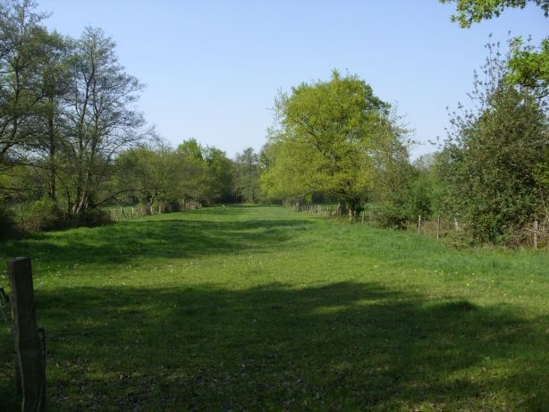 Naturschutzgebiet „Quelltäler der Wienbeck“